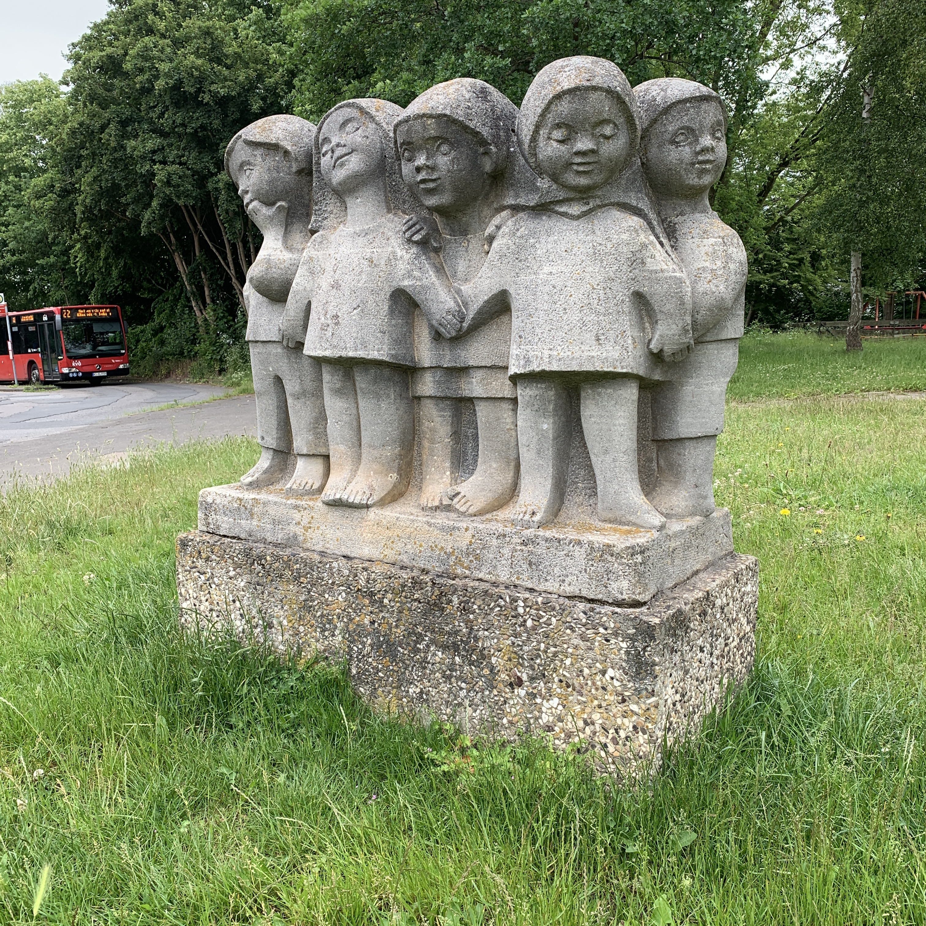 Skulptur "Neunlinge" (Kindergruppe UNICEF) Kiel-Suchsdorf